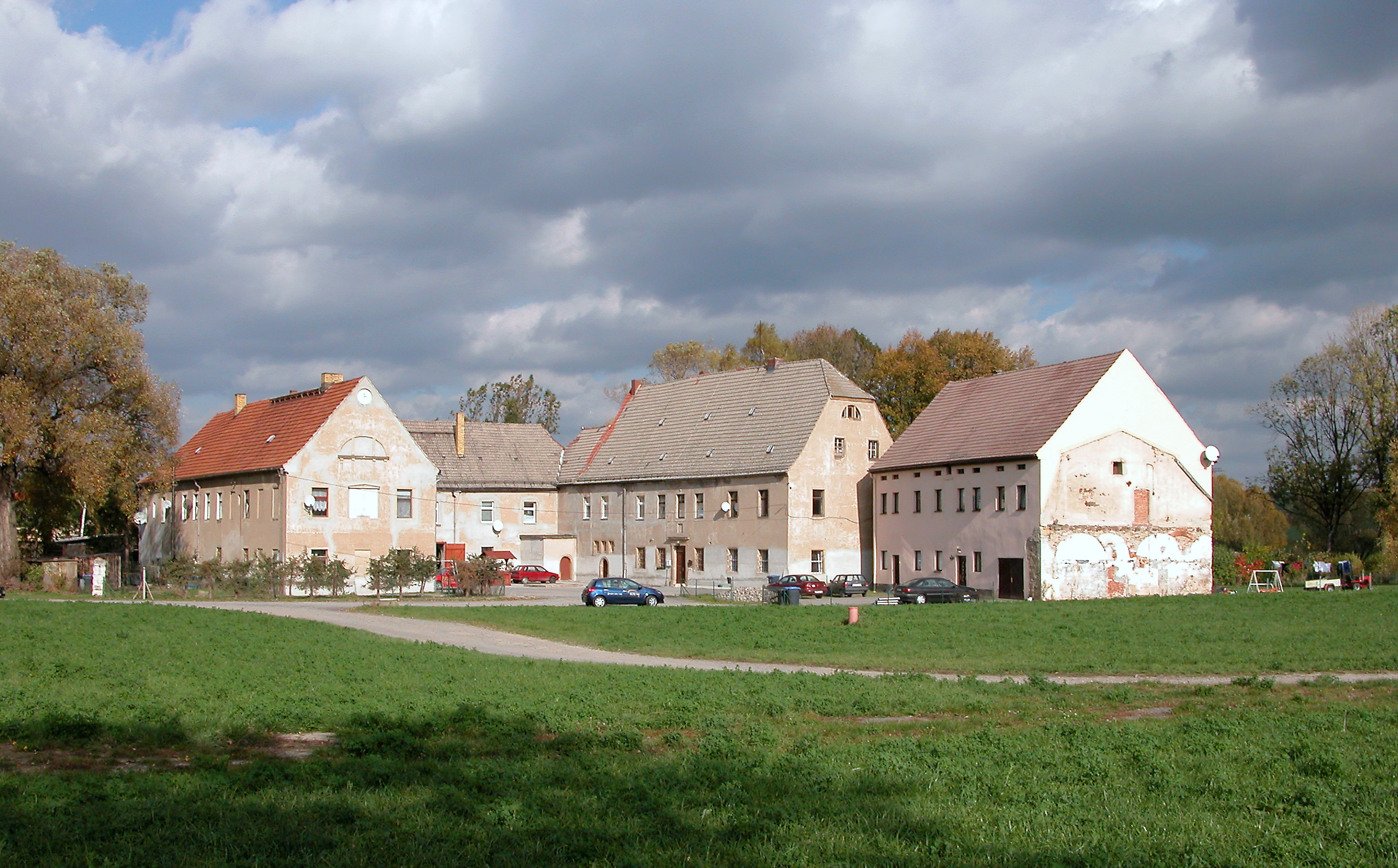 27.10.2006 01809 Krebs (Dohna), Krebs 35 (GMP: 50.937905,13.893085): Ehemaliges Rittergut mit dem Herrenhaus im Osten (vermutlich 18. Jahrhundert, rechts im Bild). Das Rittergut gehörte anfangs der Familie von Karras, kam 1515 an die Herren von Bünau zu Liebstadt. 1717 wurde Bernhard Wilhelm von Oppel mit Krebs belehnt. Bis zum Zweiten Weltkrieg ist das Rittergut im Besitz dieses Adelsgeschlechts geblieben. Der bedeutendste Besitzer war Bergrat Carl Wilhelm von Oppel. Er wurde 1819 zum Direktor der Meißner Porzellanmanufaktur berufen und 1832 mit der Leitung der Königlichen Steinkohlewerke im Plauenschen Grund betraut. Nach dem Zweiten Weltkrieg war hier ein Volkseigenes Gut und betrieb Gemüseanbau, Hopfenanbau und Viehzucht. Das Herrenhaus ist immer bewohnt gewesen. [DSCN12315.TIF]20061027200DR.JPG(c)Blobelt